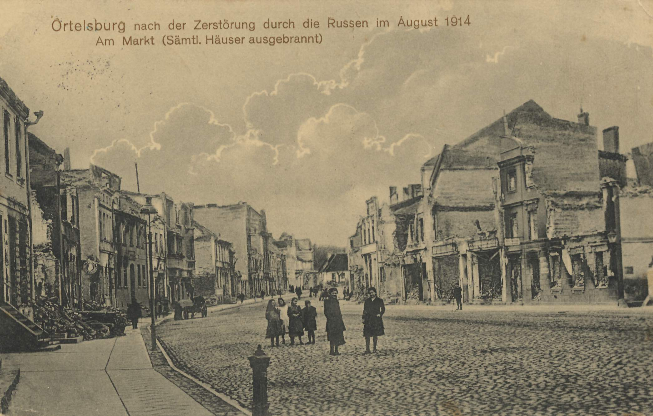 Marktplatz